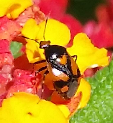 Weichwanze der Art Deraeocoris schach, am 20.6.2016 an der Côte d’Azur